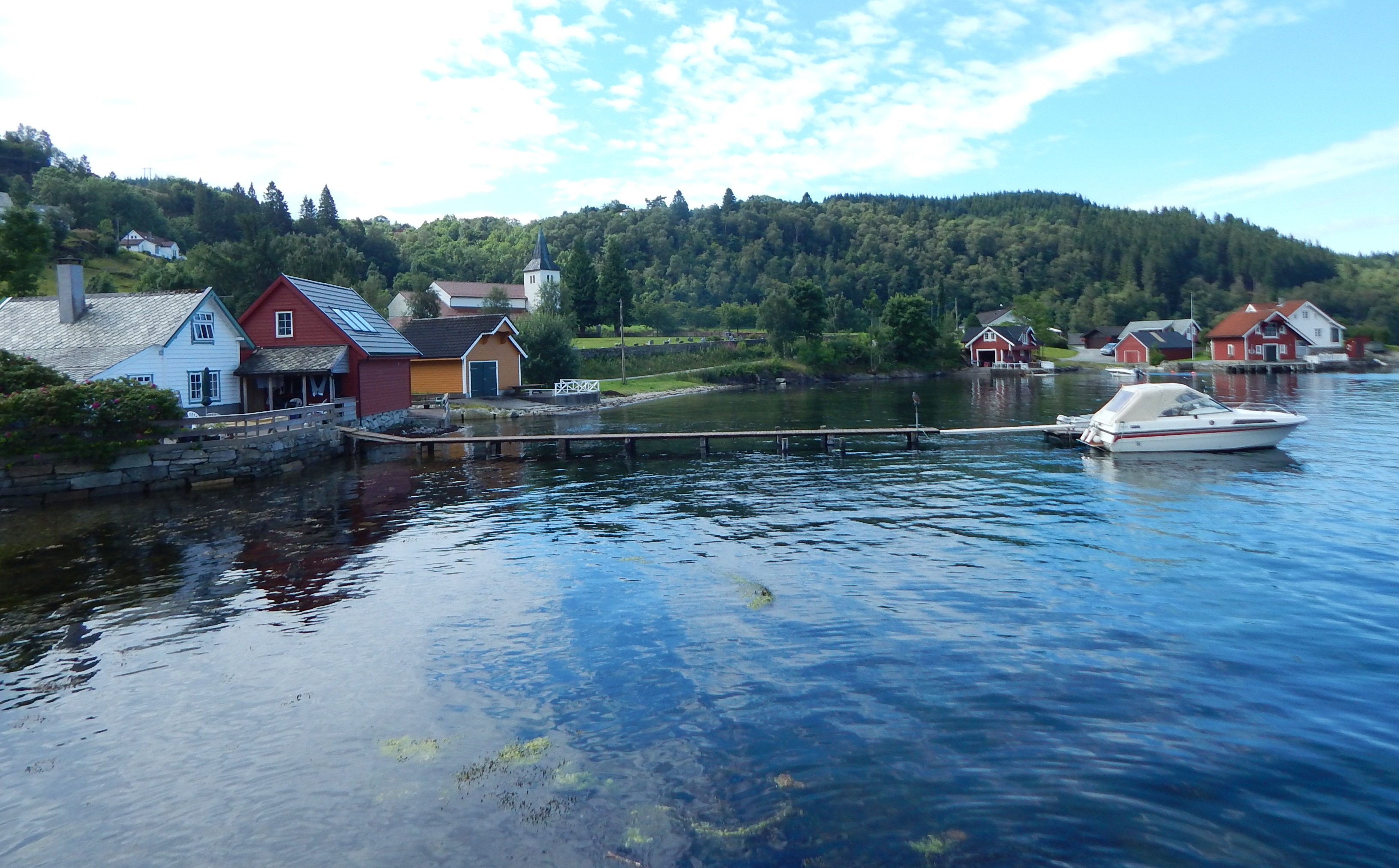 Fusavika, med Fusa kirke i bakgrunnen